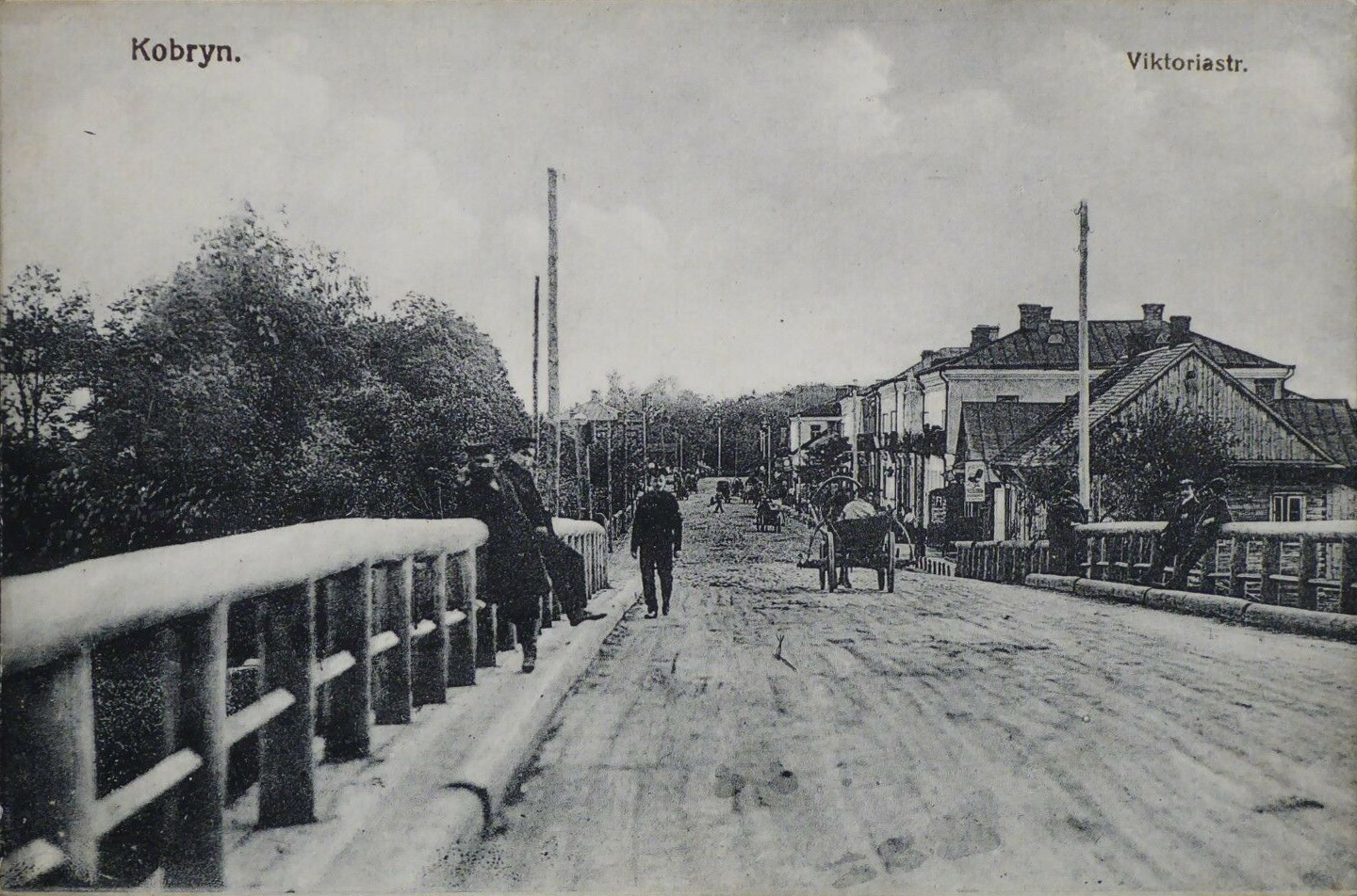 Беларуская (тарашкевіца): Кобрынь (Kobryń), вуліца Бабруйская (vulica Babrujskaja). Мост цераз раку Мухавец (Muchaviec)